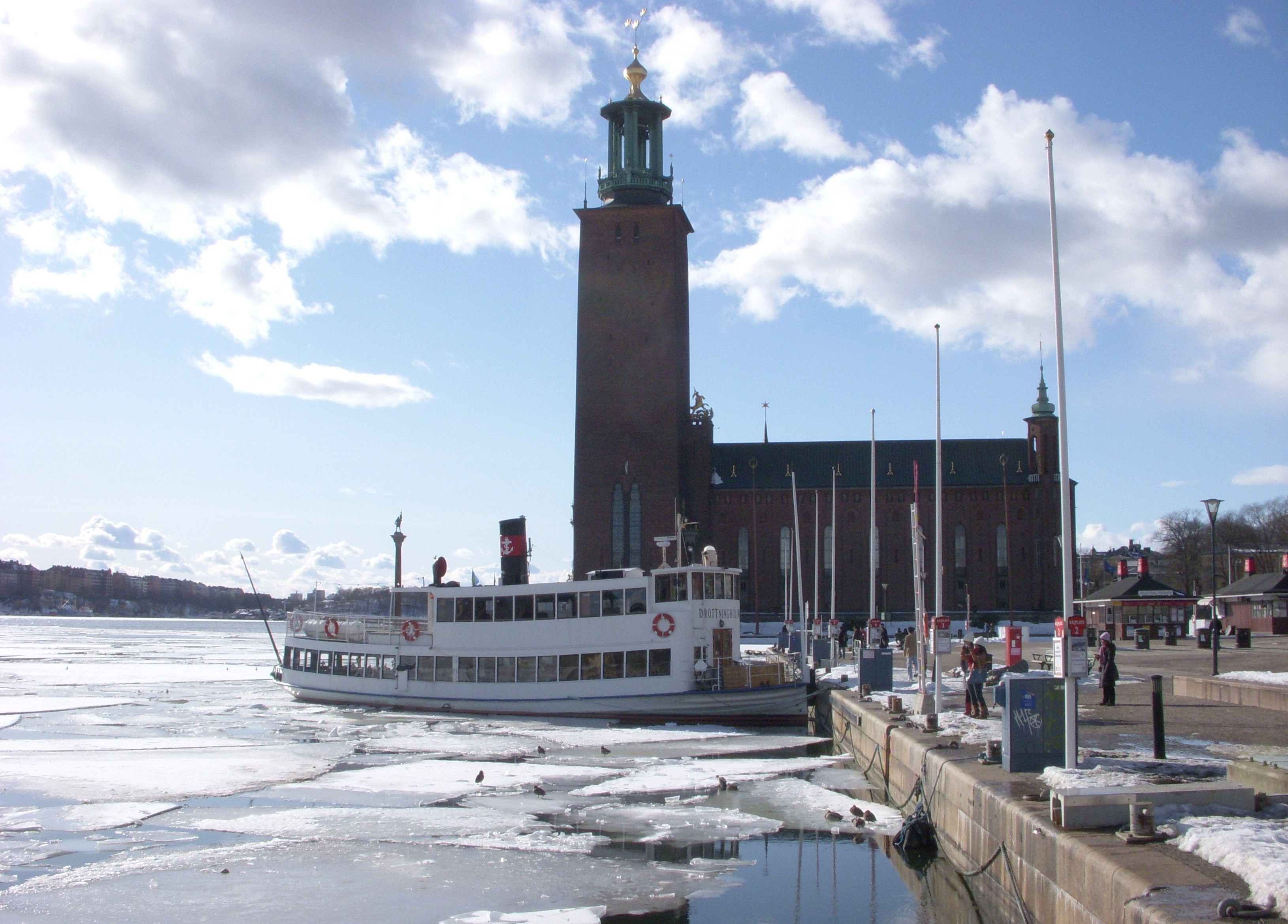 Stockholms stadshus och Stadshuskajen mars 2010